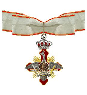 Orde van Carol I Kruis van een Commandeur of Grootofficier